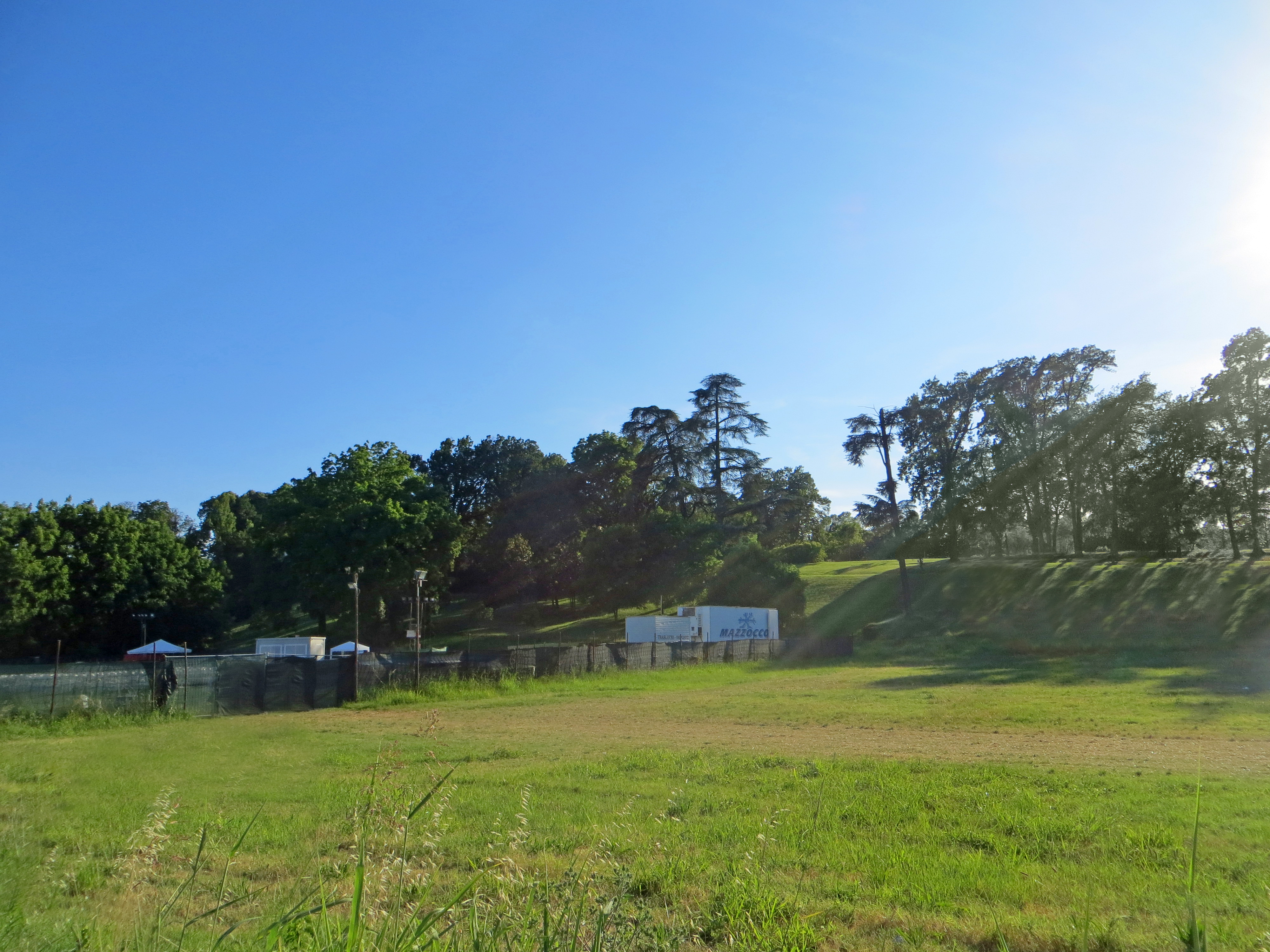 Villa Pallavicini (Arola, Langhirano) - parco